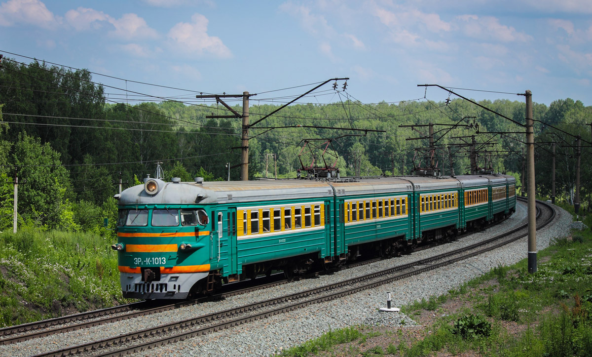 Электропоезд построен в десятивагонной составности. С завода поступил в депо Новосибирск. 09.2015 — передан в депо Омск. 11.2015 — передан в депо Новосибирск. 02.2017 г. — КР Красноярский ЭВРЗ, перекрашен в корпоративные цвета ОАО "РЖД" Вагон ЭР2-101306 переделан в электромотрису МВэ-01, в место него с конца 90-х года работал вагон ЭР2-31208. В мае 1998 прошёл ТР-3 в депо Инская, при котором был разграблен и был отправлен на б/з Кожурла. С августа по октябрь 2005 года проходил КРП на КрЭВРЗ в составности 01,02,03,04,08,07,10,09. Вагон 101305 с августа 2005 по январь 2007 года находился в депо Новосибирск, в январе 2007 года был отправлен на КРП в депо Алтайская и вошёл в состав ЭС2-013. (по данным сайта "Российские электропоезда")